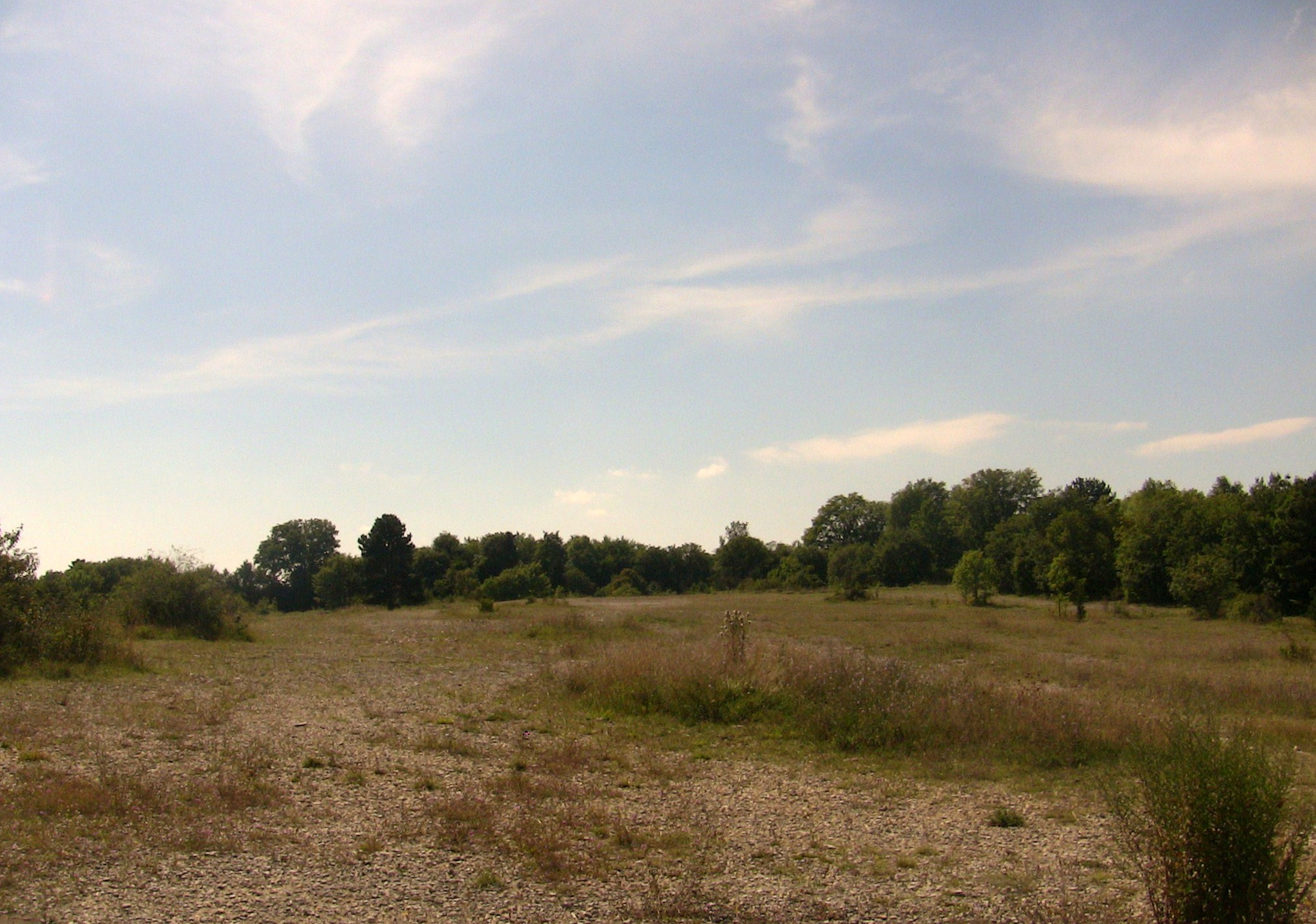 Le grand désert à Besançon (Doubs, France).